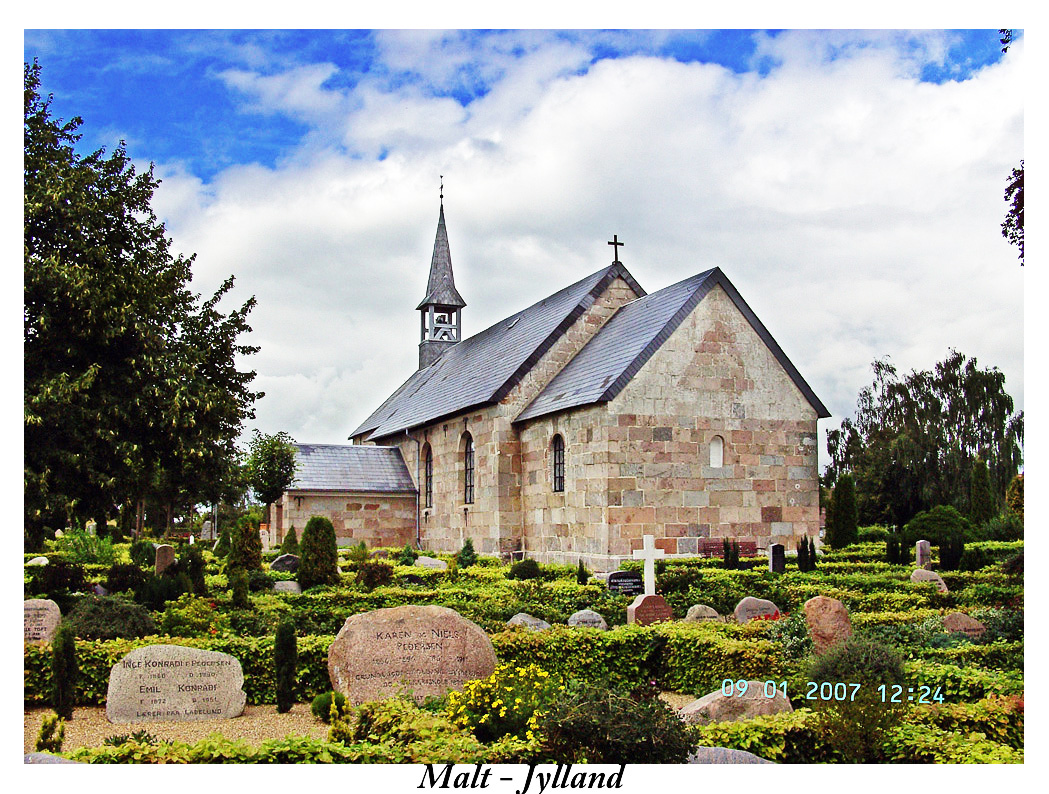 fra sydøst